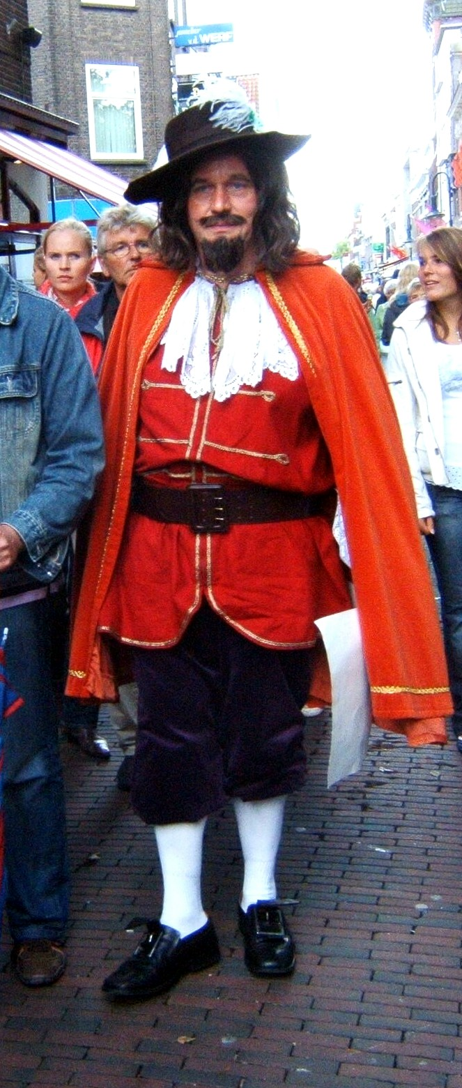 Stadsomroeper van Meppel, Egon Zwikker, tijdens DMD 2007.